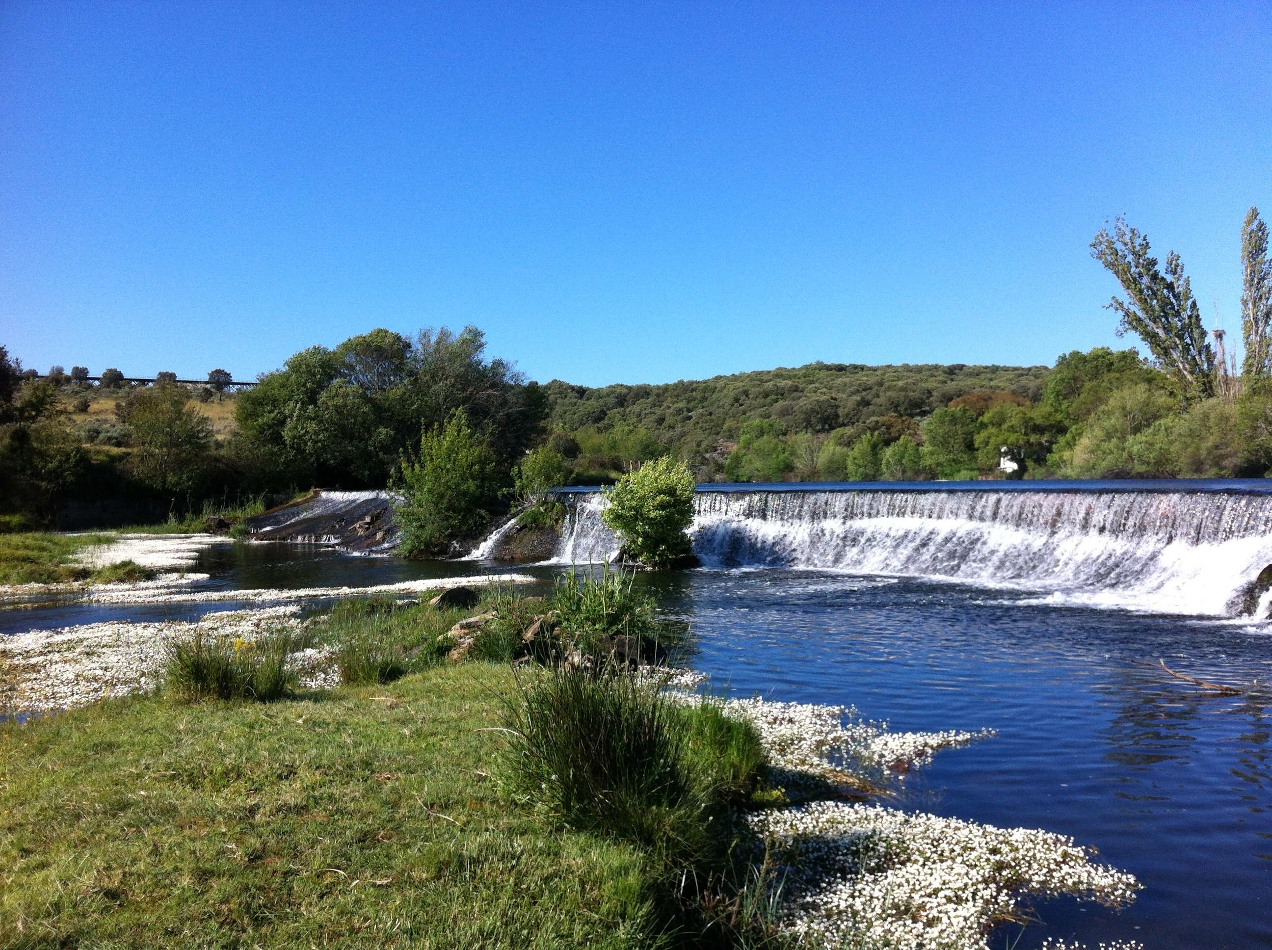 Riberas de los ríos Huebra, Yeltes, Uces y afluentes This is a photography of a Site of Community Importance in Spain with the ID: ES4150064. Natura2000 entry, EEA entry